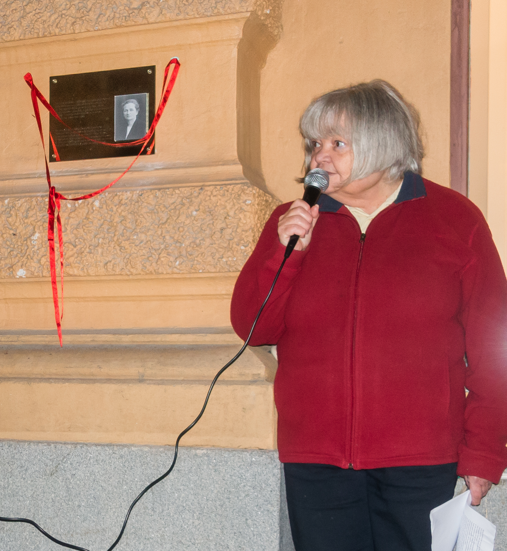 Anne-Marie Lindgren den 27 november 2019 vid invigningen av minnesmärket över Agda Östlund på Upplandsgatan 61 i Stockholm.